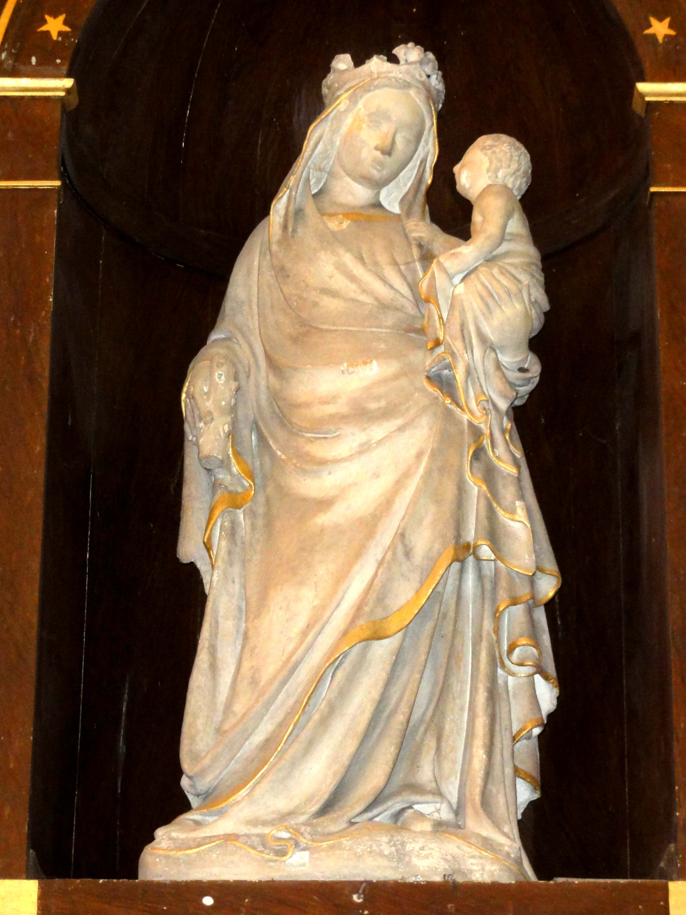 Mobilier de l'église - voir titre.